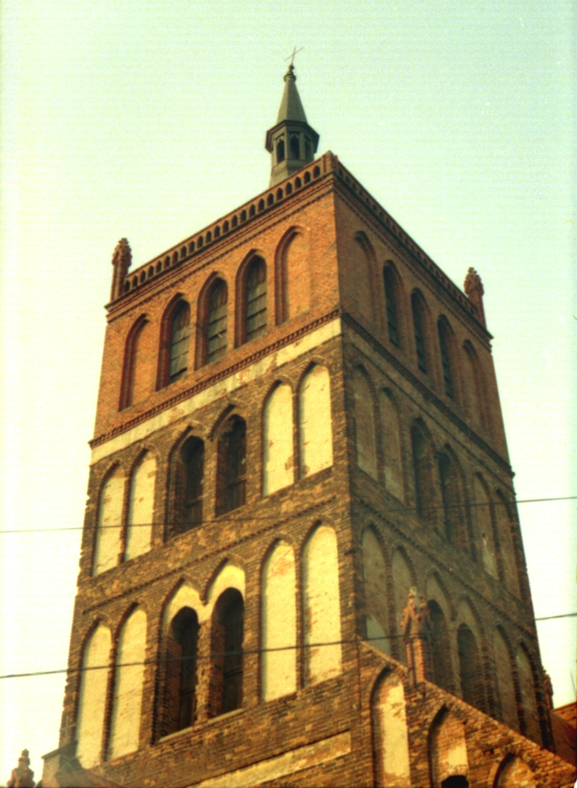 Chełmża, ST NICHOLAS' CHURCH. 2007